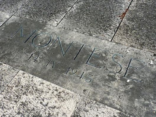 Montese (MO) - la sua conquista fu una delle tappe fondamentali della campagna della FEB in Italia